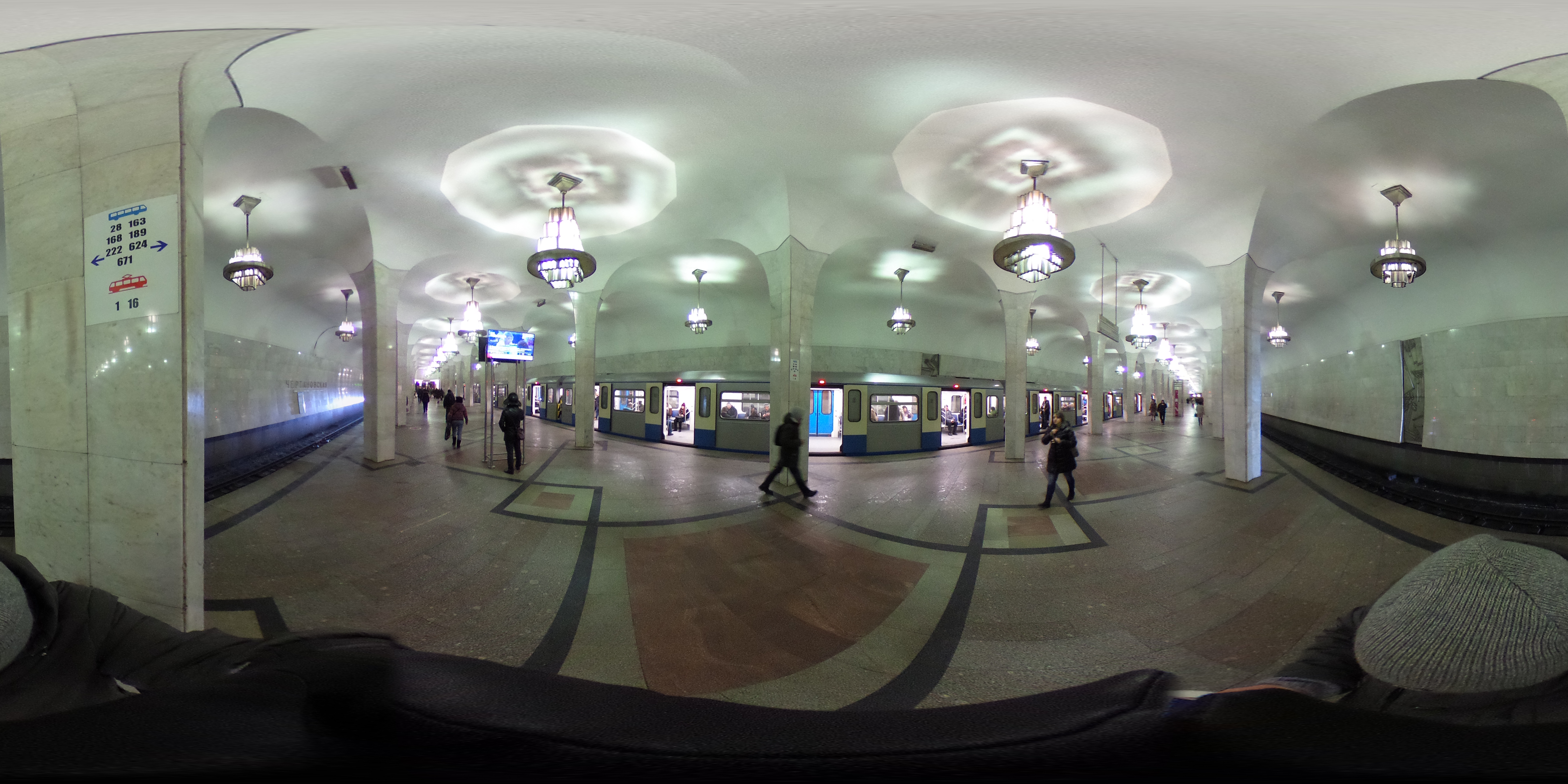 Московский метрополитен, станция метро Чертановская. Платформа.